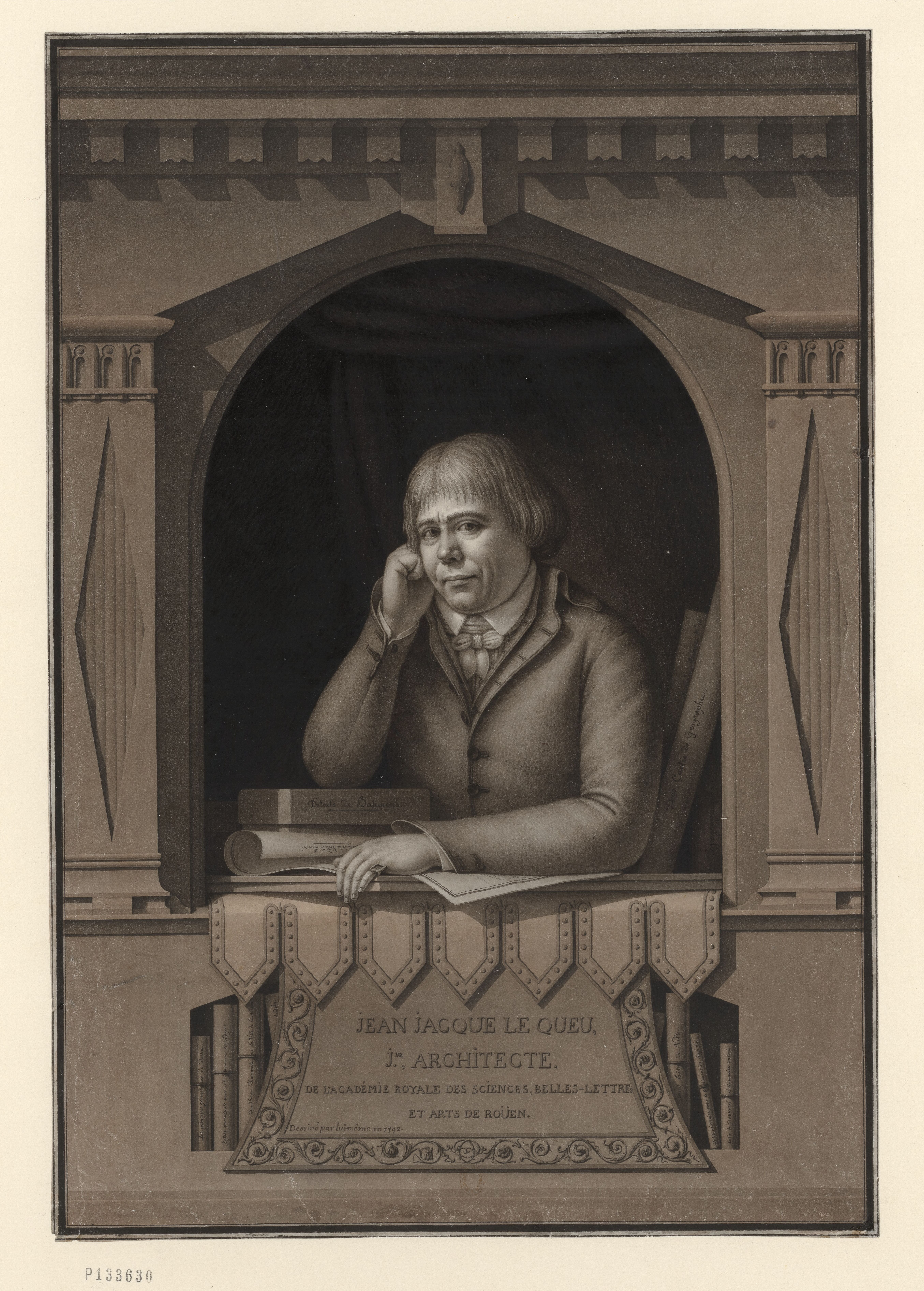 Autoportrait